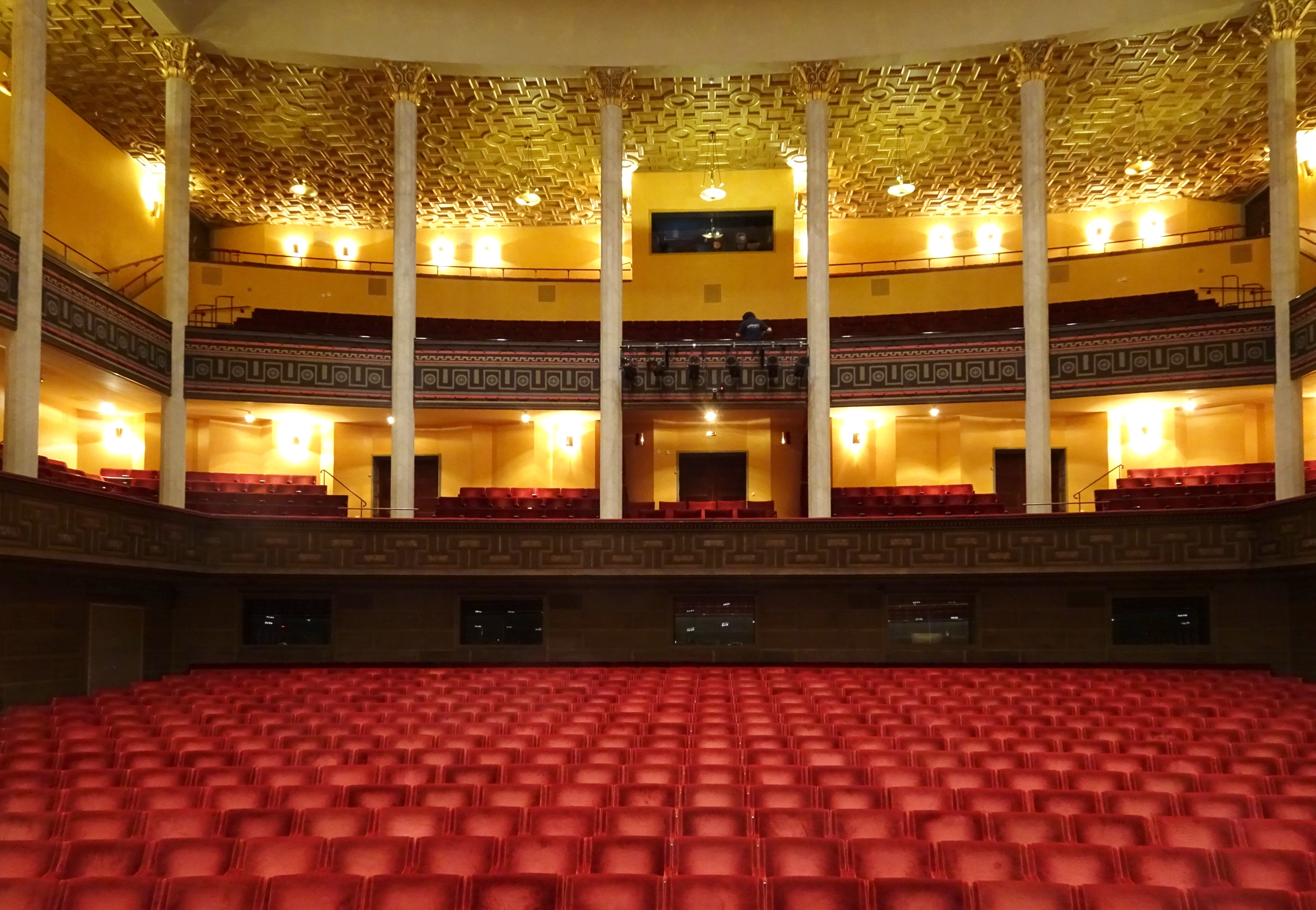 Konserthuset Stora Salongen